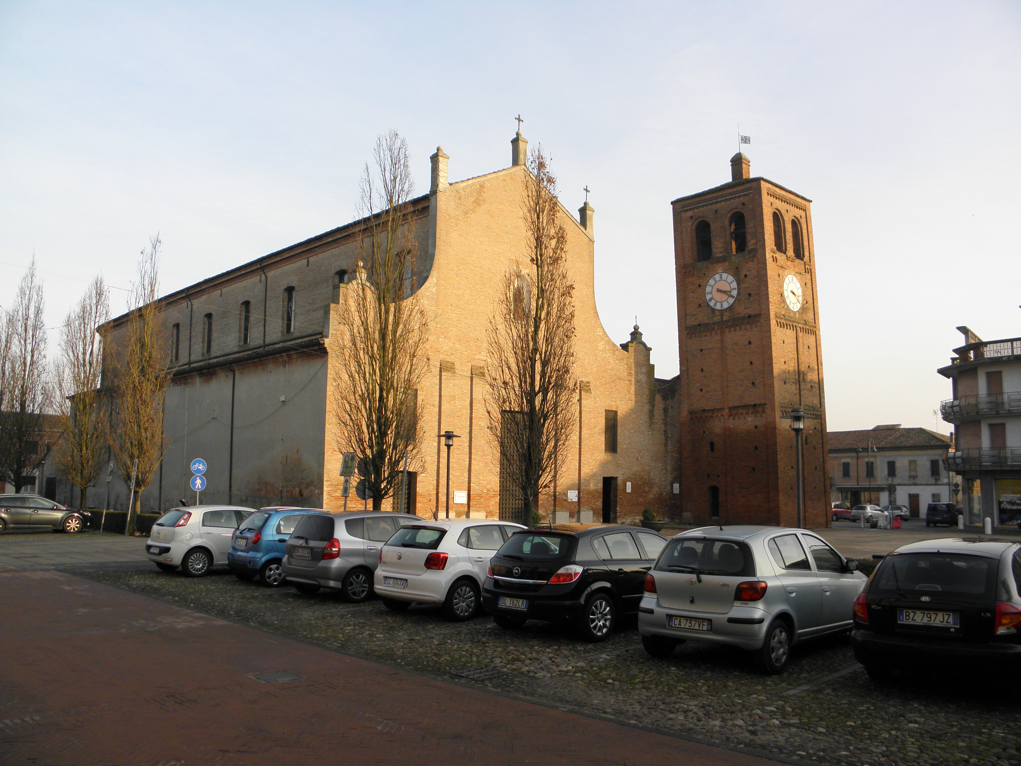 Massa Fiscaglia, già comune autonomo e ora frazione del comune di Fiscaglia: la settecentesca chiesa dei Santi Pietro e Giacomo con a fianco il più antico campanile in stile romanico-lombardo.